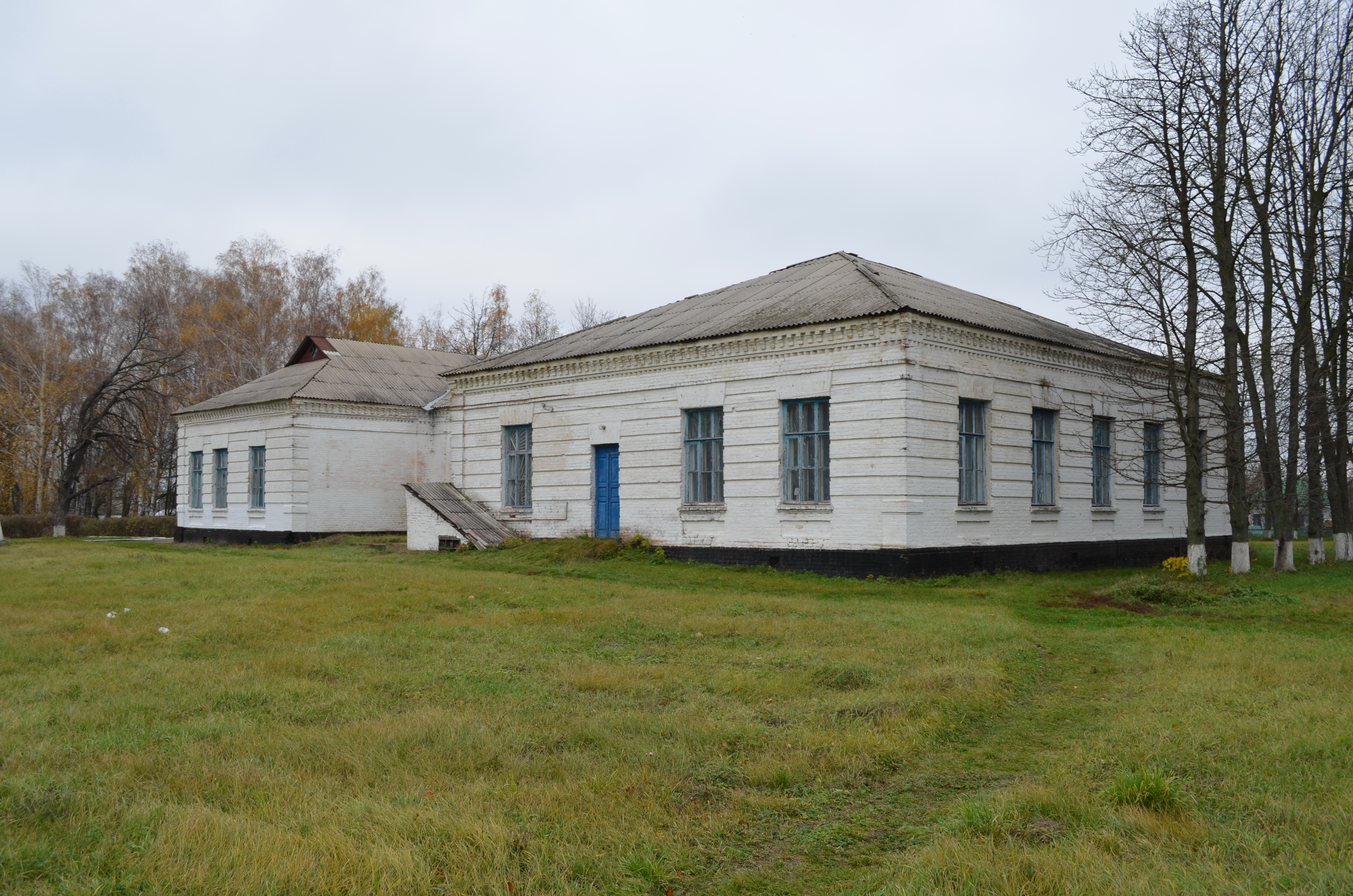 Комплекс споруд садиби поміщиці Семиградової, село Веселинівка